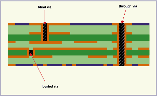 Монгол: Via буюу давхаргуудыг холбох нүхнүүдийн 3 төрөл